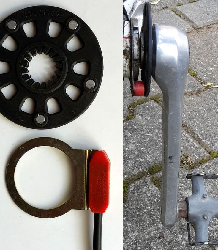 Tretkurbel-Drehsensor: Hallsensor (rot), Scheibe mit Permanentmagneten (schwarz); montiert an linker Seite der Tretkurbel